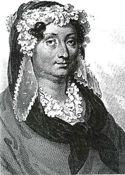 Adélaïde Dufrénoy (1765-1825), French authoress.